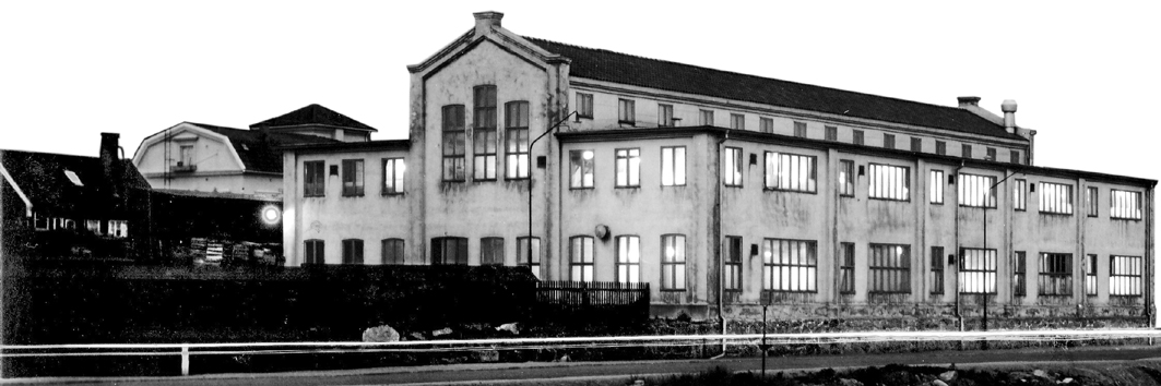 Karlskrona Lampfabrik sedd från Pantarholmskajen 1955.